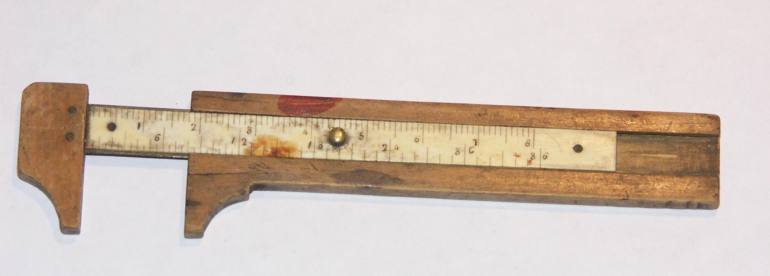 Pied à coulisse double graduation